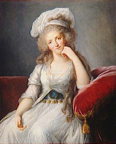 Portrait of Louise Marie Adélaïde de Bourbon (1753-1821)